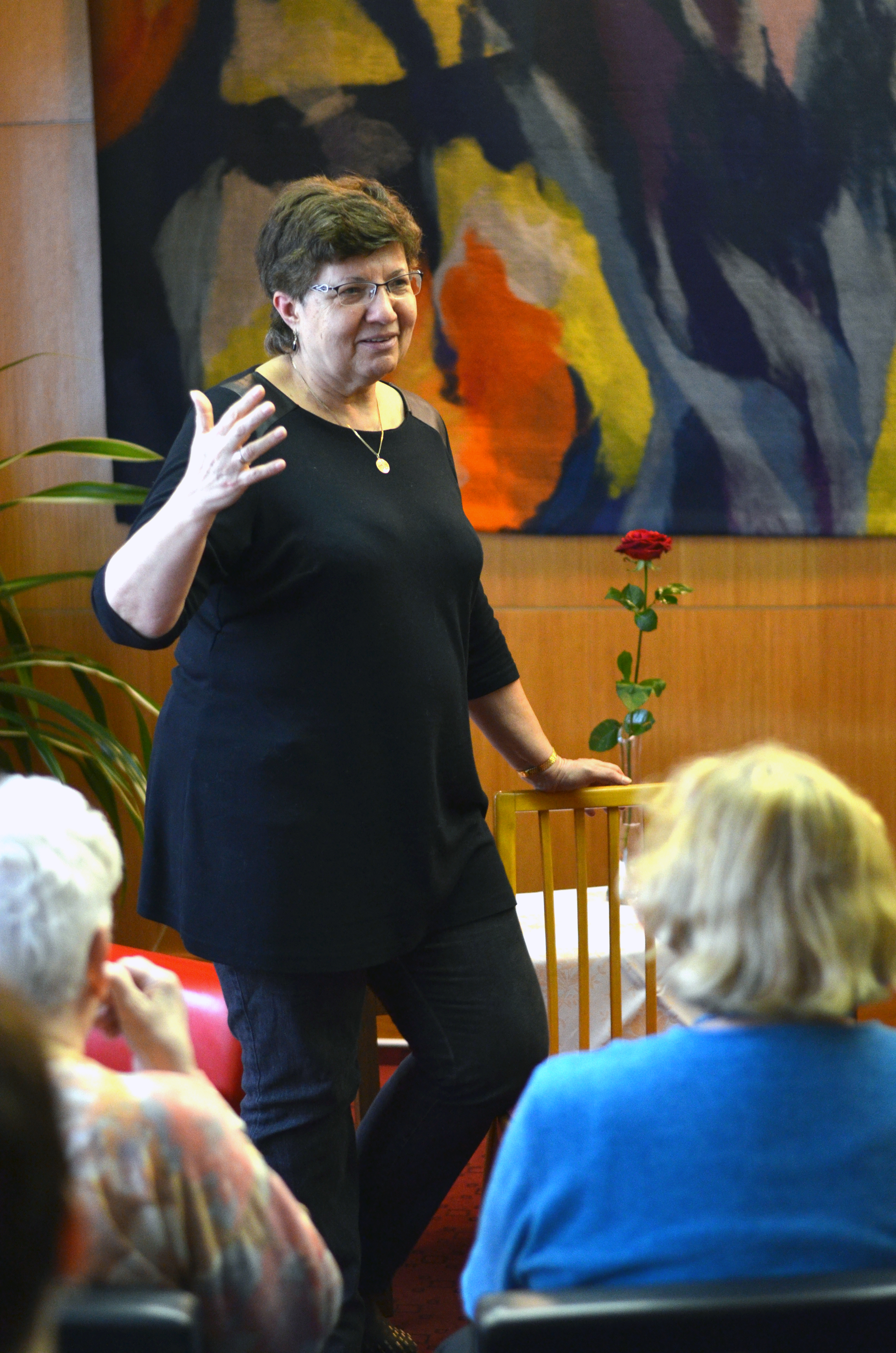 Marie Formáčková na besedě v Adamově